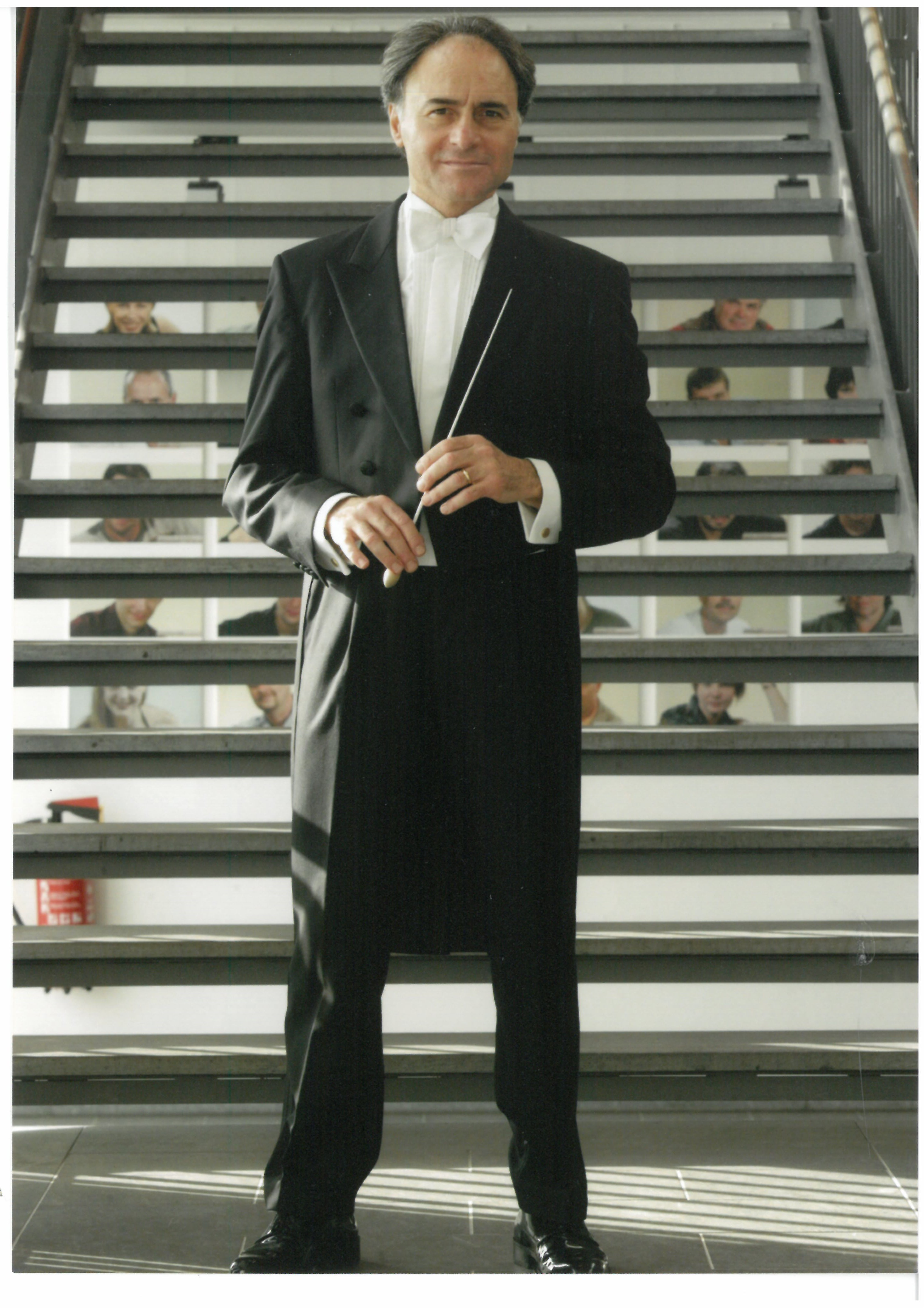 Michele Carulli Direttore d'orchestra